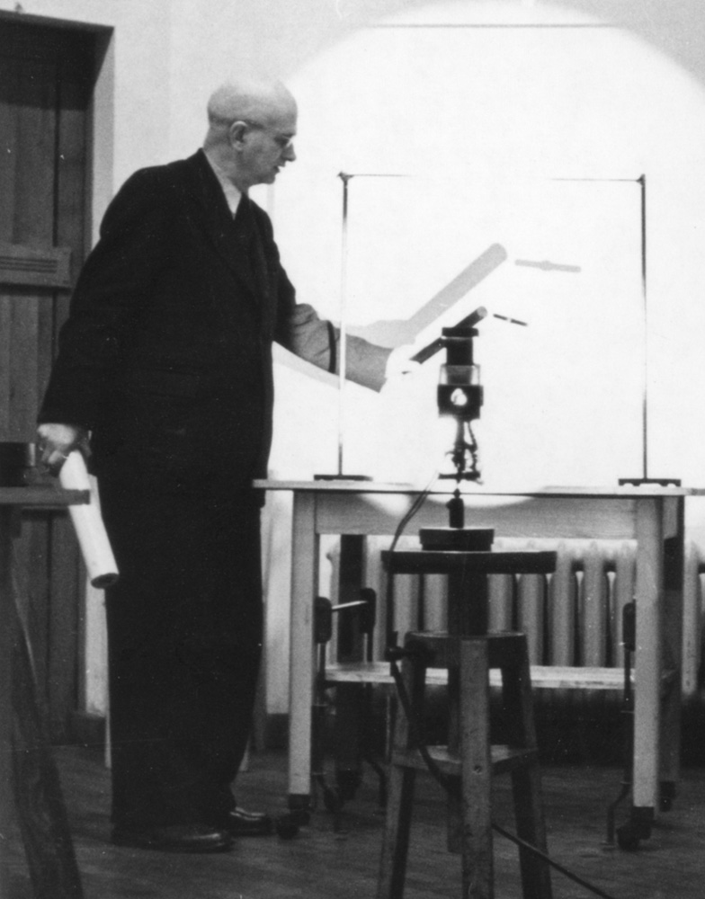 Professor Waldemar Ilberg bei einer Experimentalphysik-Vorlesung etwa 1957 in Leipzig